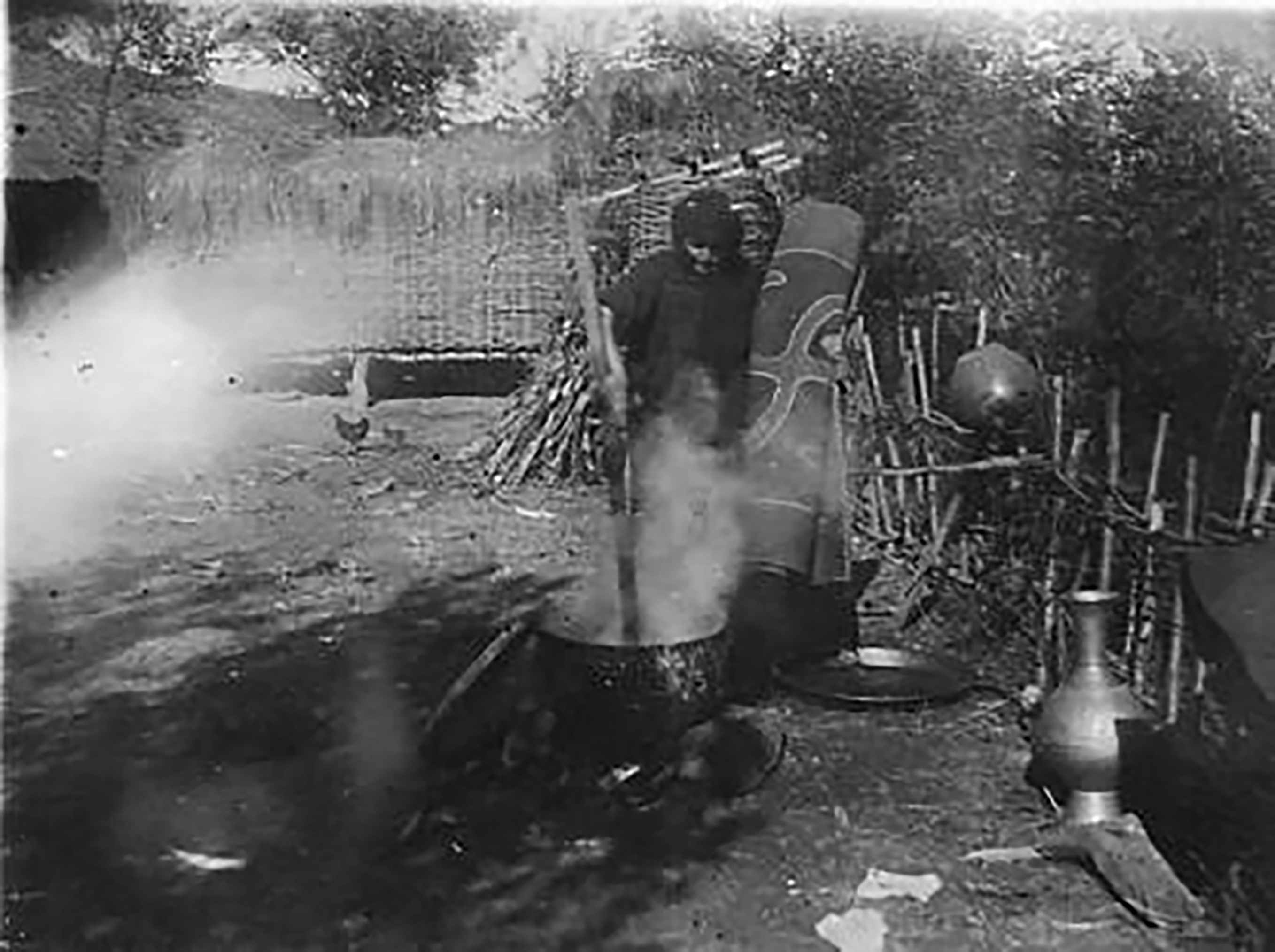 Окраска войлочных ковров в ауле Герменчук Россия, Чечня/Шалинский округ